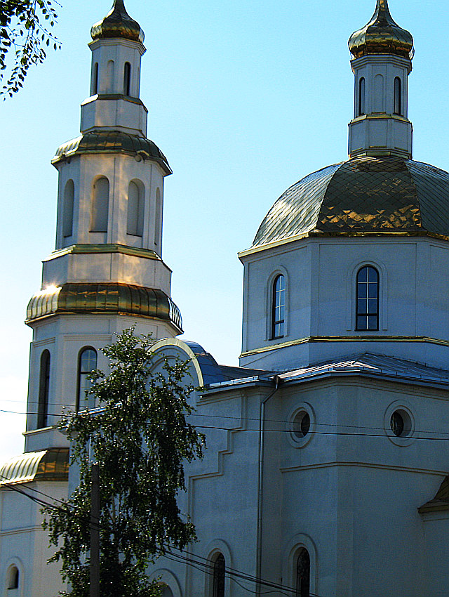 Свято-Иоанно-Богословская церковь